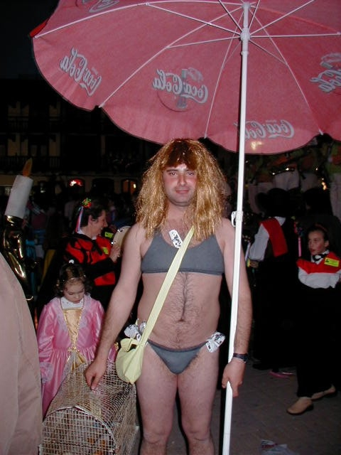 Autor: Jesús Ruiz